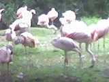 Grupo de flamencos en el agua.